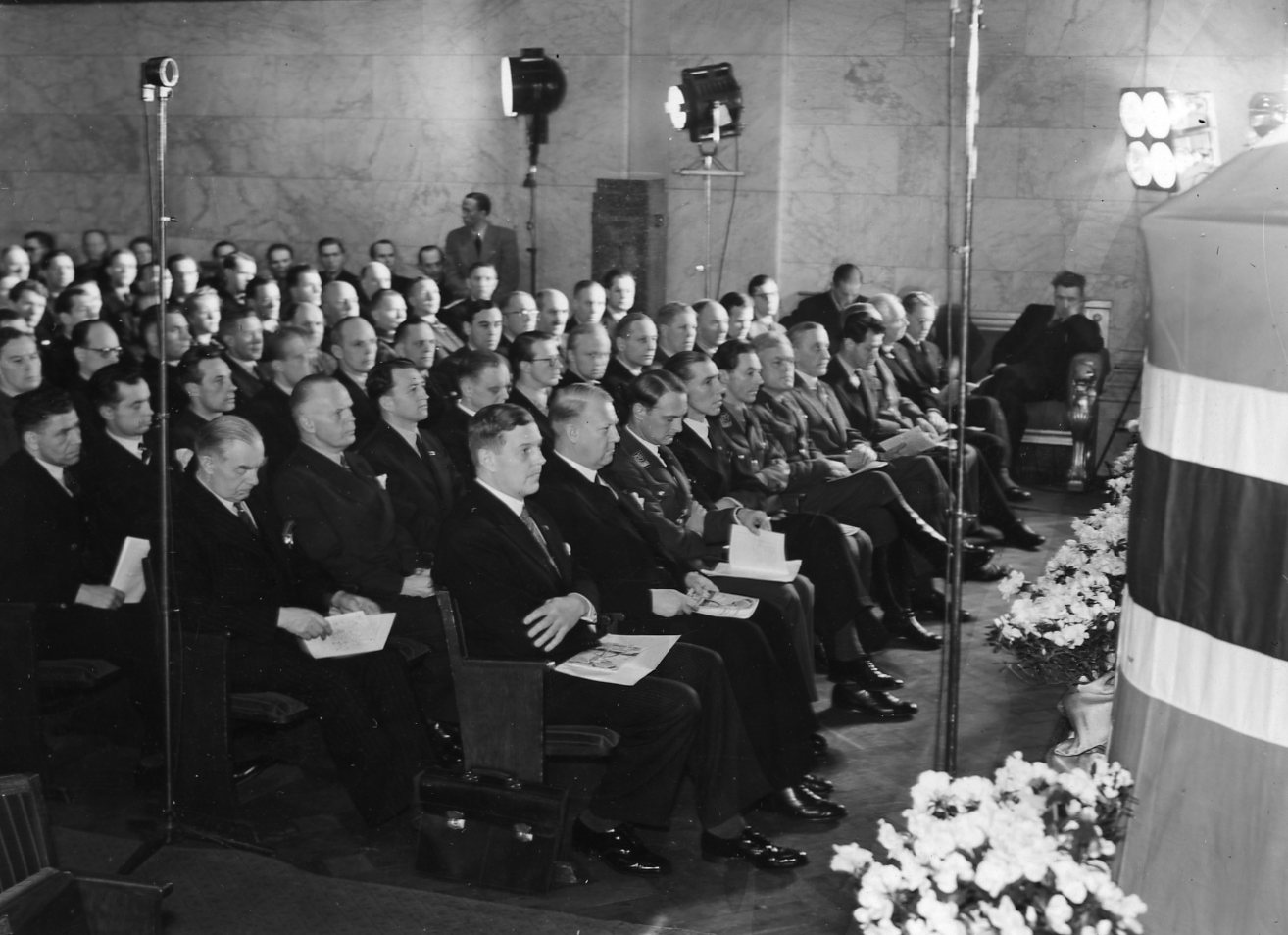 RA/RAFA-3309/U 40C/4/13-4 img284